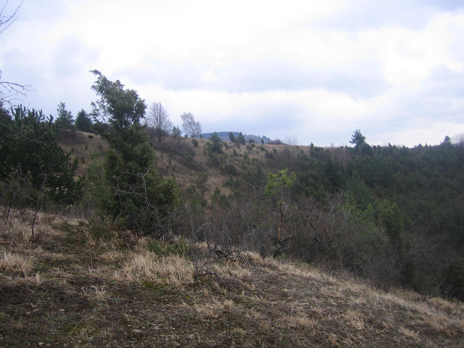 Wacholderlandschaft am Kleinen Dörnberg im Naturschutzgebiet „Dörnberg“, im Hintergrund mittig der Hohe Dörnberg; Hessen